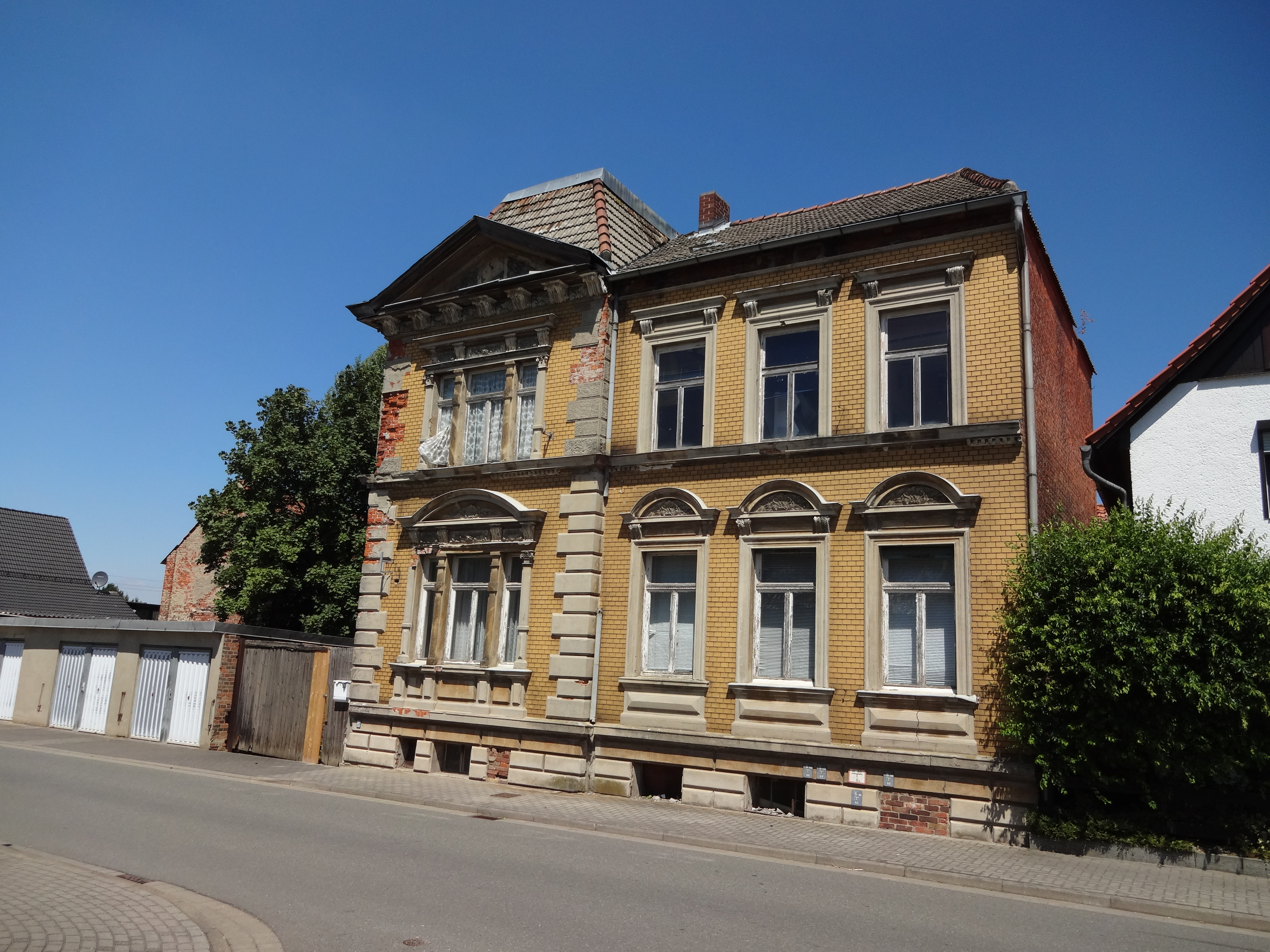 denkmalgeschütztes Wohnhaus in der Straße Seidenbeutel 10 in Dedeleben